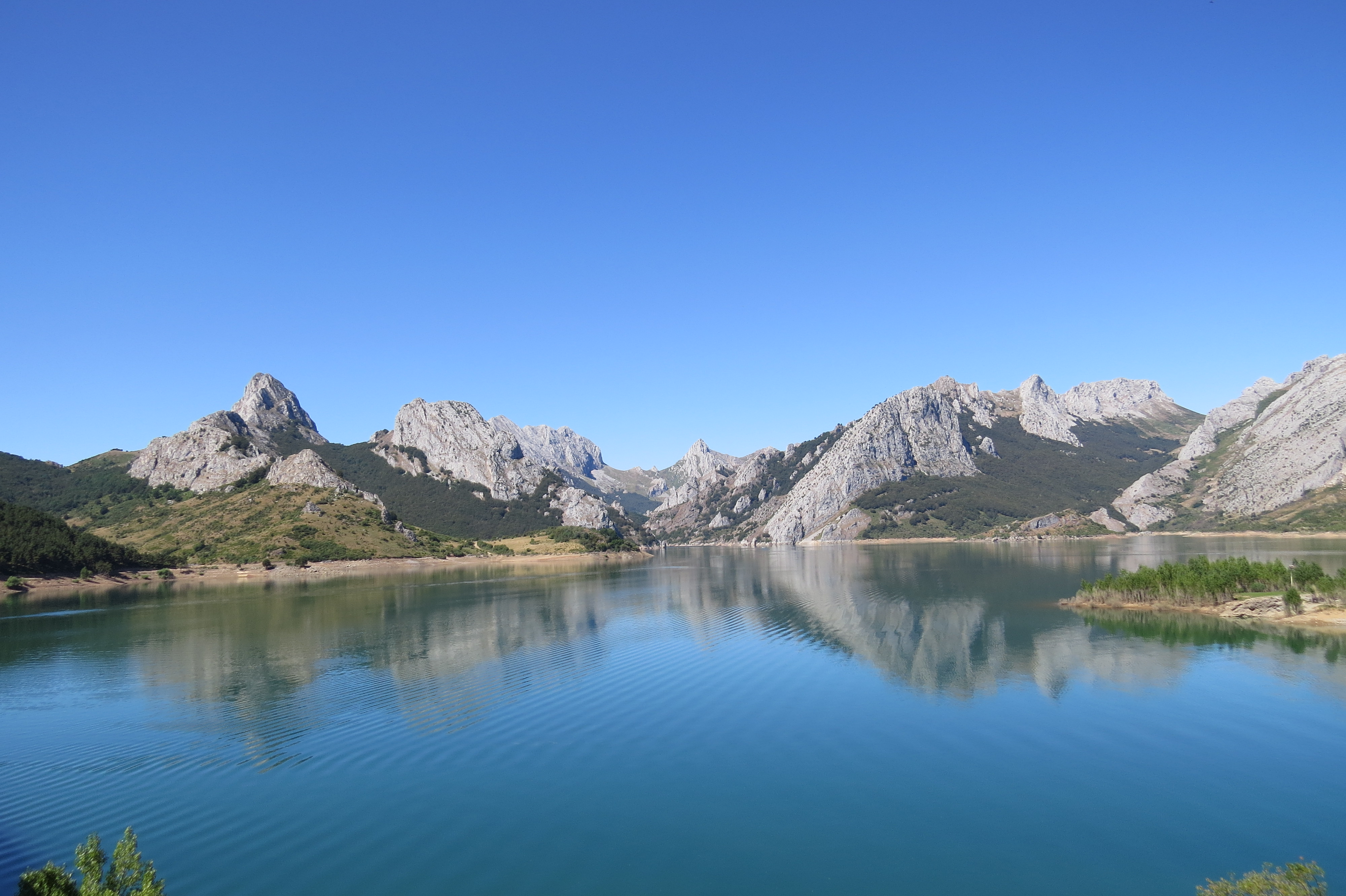 Riaño, León, Spain